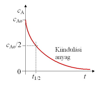 Kémiai reakció felezési idejének szemléltetése